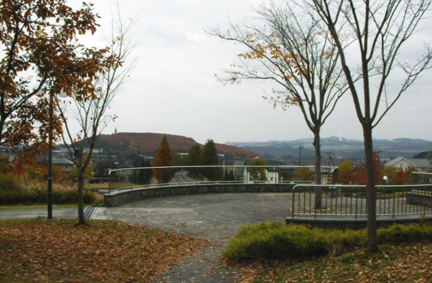 紫山公園から南を望む